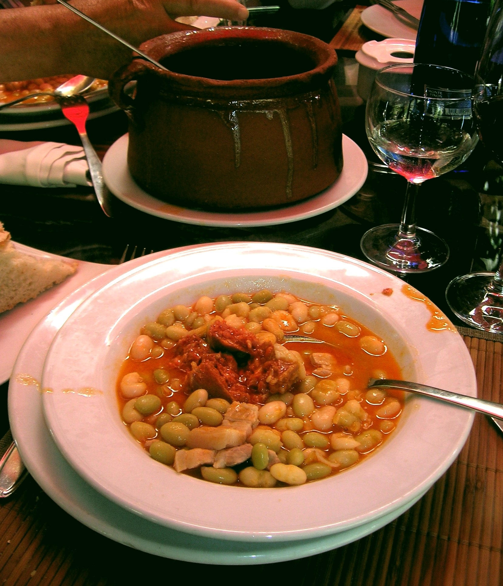 Plato y olla de pochas a la riojana, con chorizo